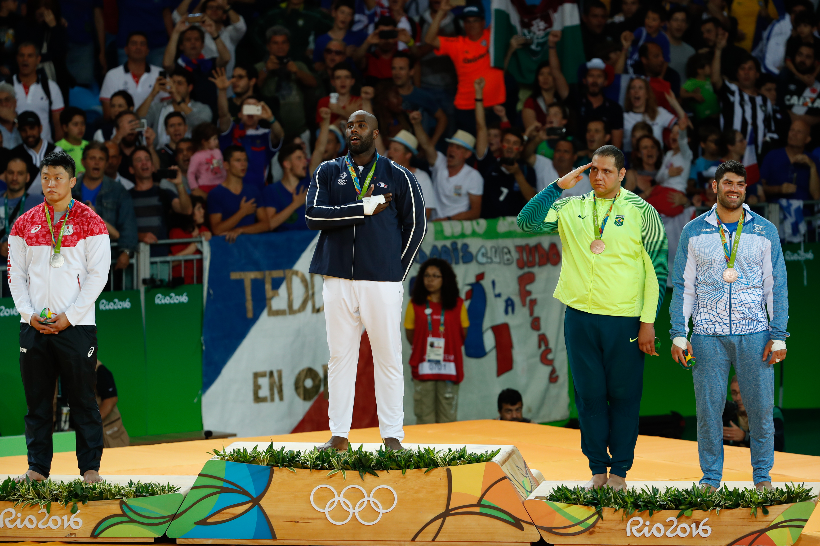 Rio de Janeiro - Judoca Rafael Silva, o Baby ganha medalha de bronze nos Jogos Olímpicos Rio 2016 (Fernando Frazão/Agência Brasil)